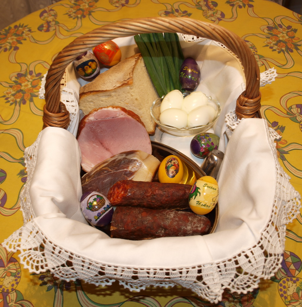 Uskršnja košarica sa posvećenja.